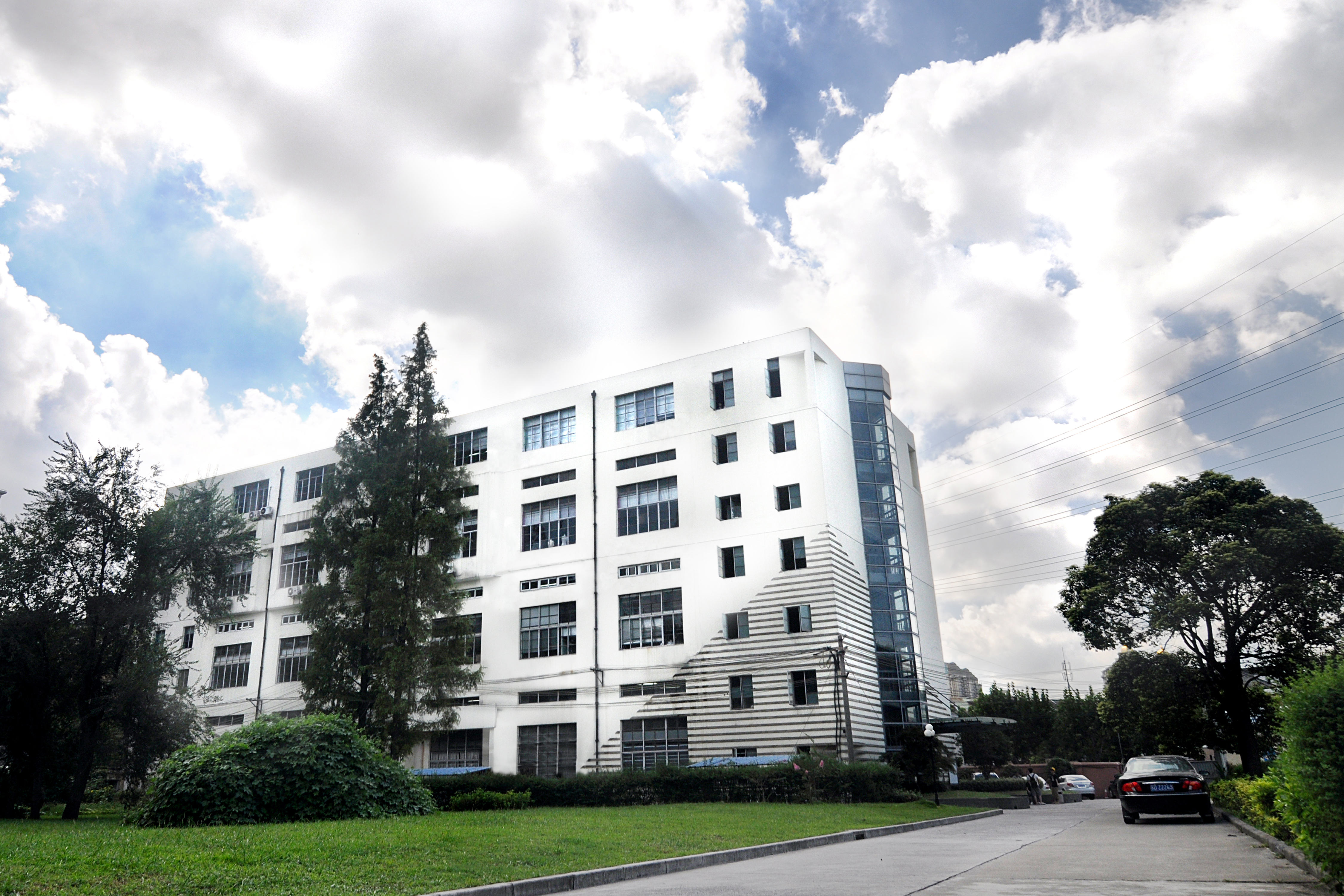 School of Shanghai - IFA Paris